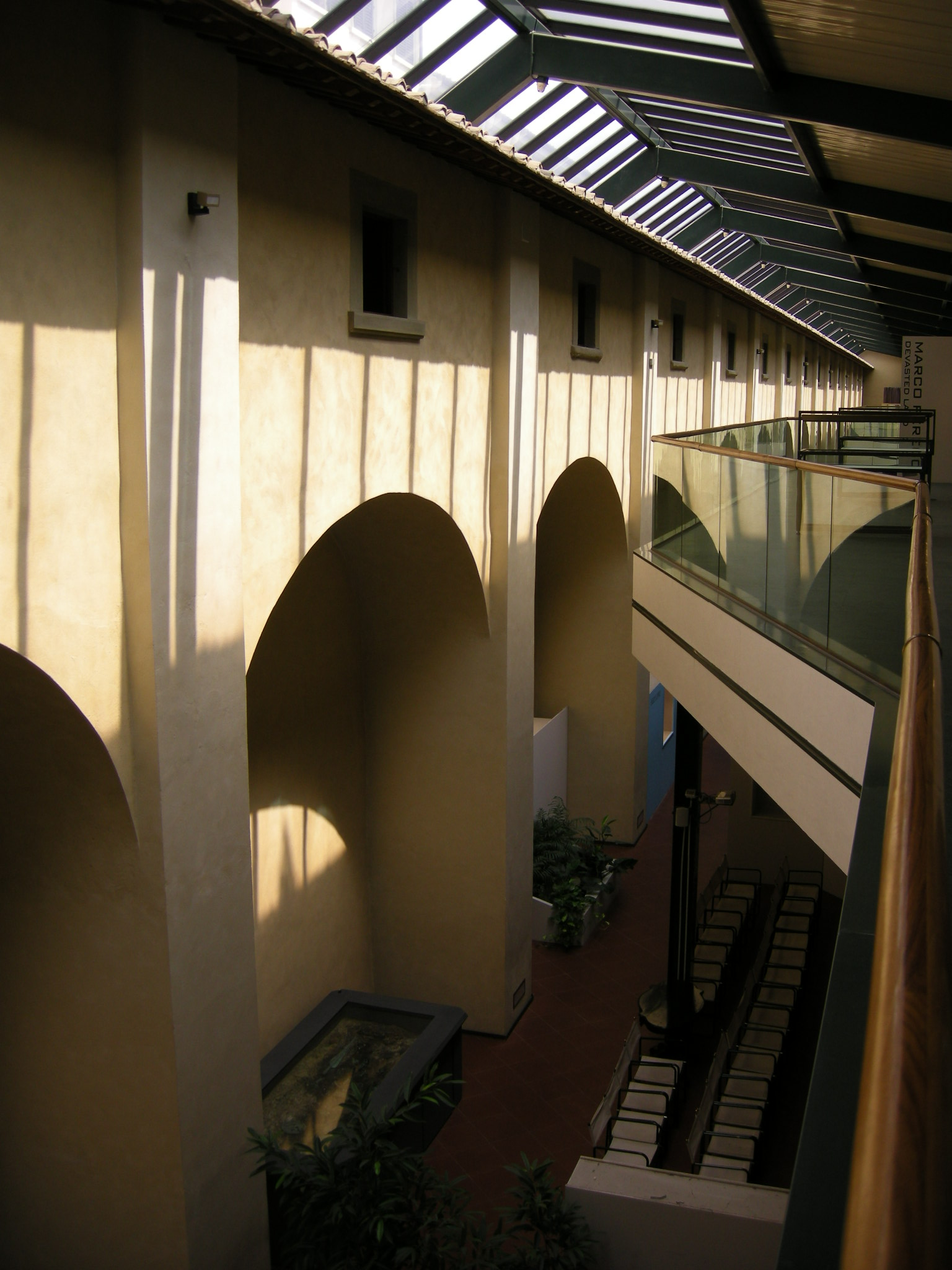 Corridoio mediceo del Palazzo della Crocetta, in piazza Santissima Annunziata 1, che risale al 1620, e fu costruito da Giulio Parigi come residenza della principessa Maria Maddalena de' Medici. Oggi ospita il Museo archeologico nazionale di Firenze.